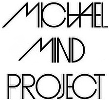 Logo des Michael Mind Projects (2013)